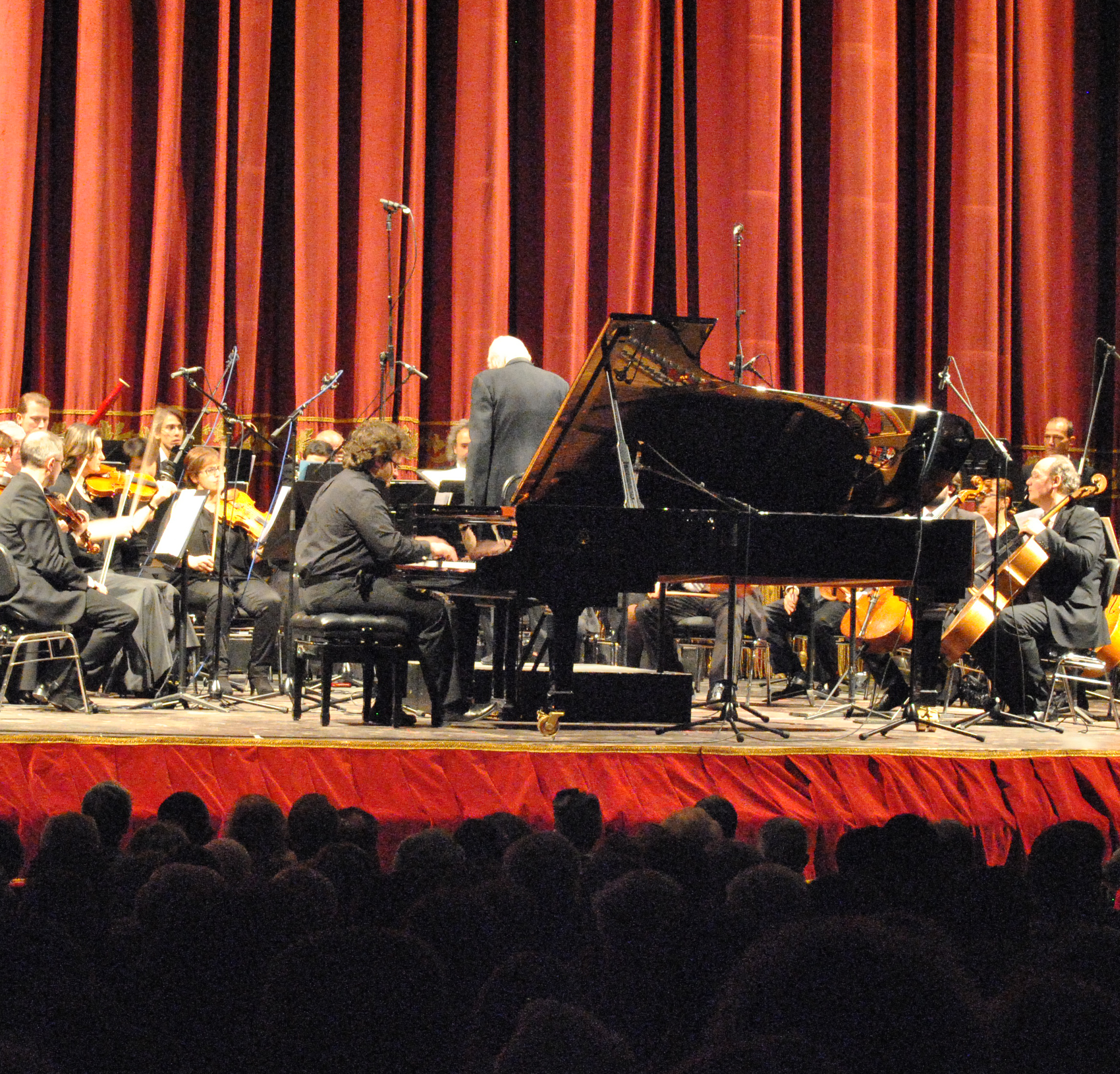 Francesco Mazzoli joue le K466 de W.A.Mozart, Filarmonico 2014